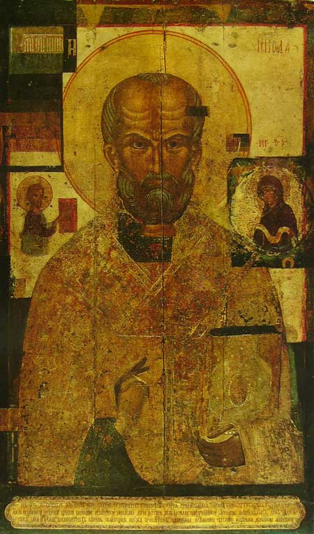 Икона Николая Угодника XIV века. 52 × 91 см. Хранится в Государственной Третьяковской галерее (Москва). Происходит из собора Рождества Иоанна Предтечи Иоанно-Предтеченского женского монастыря во Пскове [1].